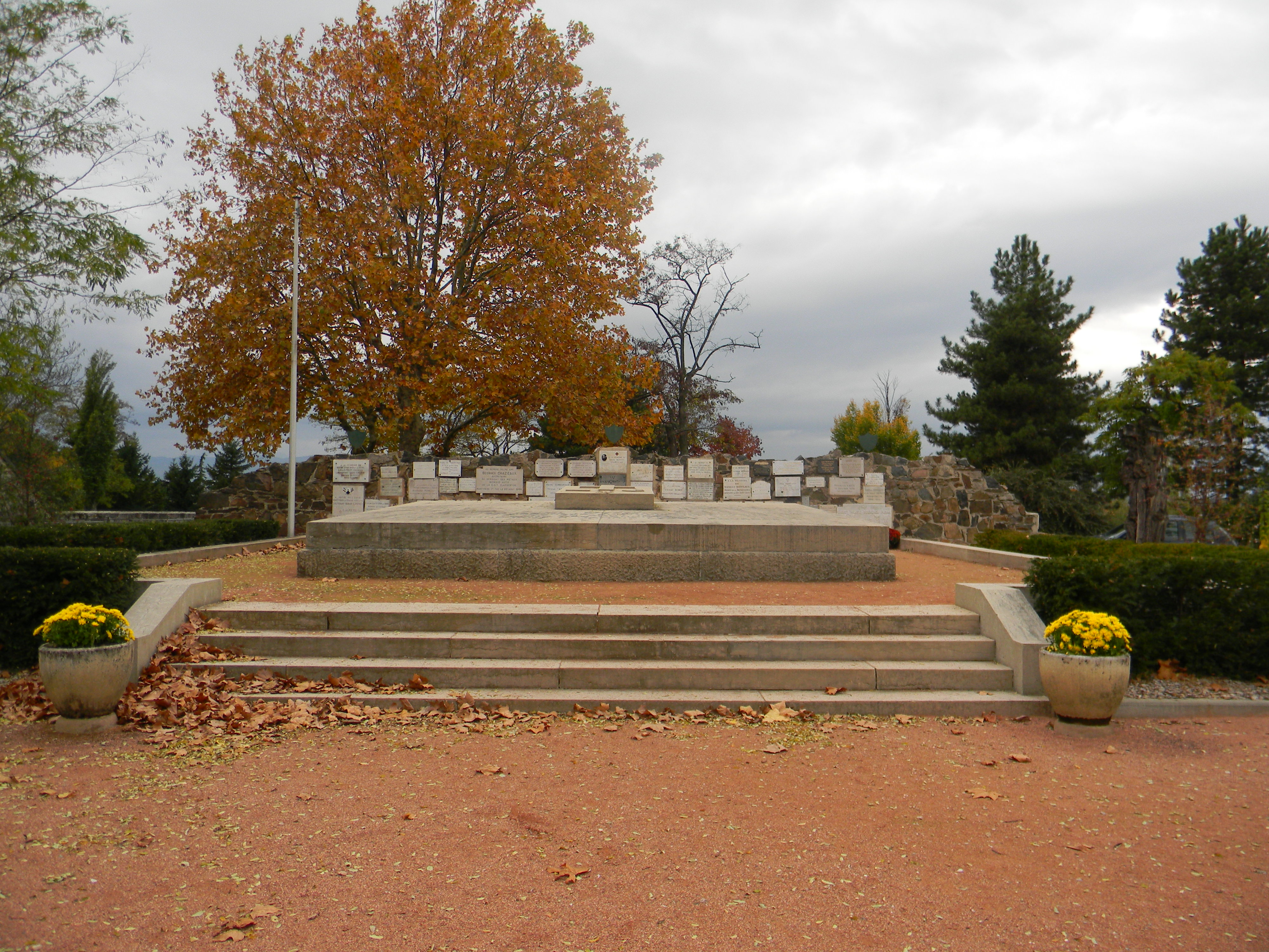 Mémorial commémorant le massacre de 120 prisonnier du Fort Montluc le 20 août 1944 par les Allemands. Cet édifice a été construit sur ce qui était la maison du gardien du Fort de Côte-Lorette, les corps ont été enterrés dans le souterrain de ce logement.